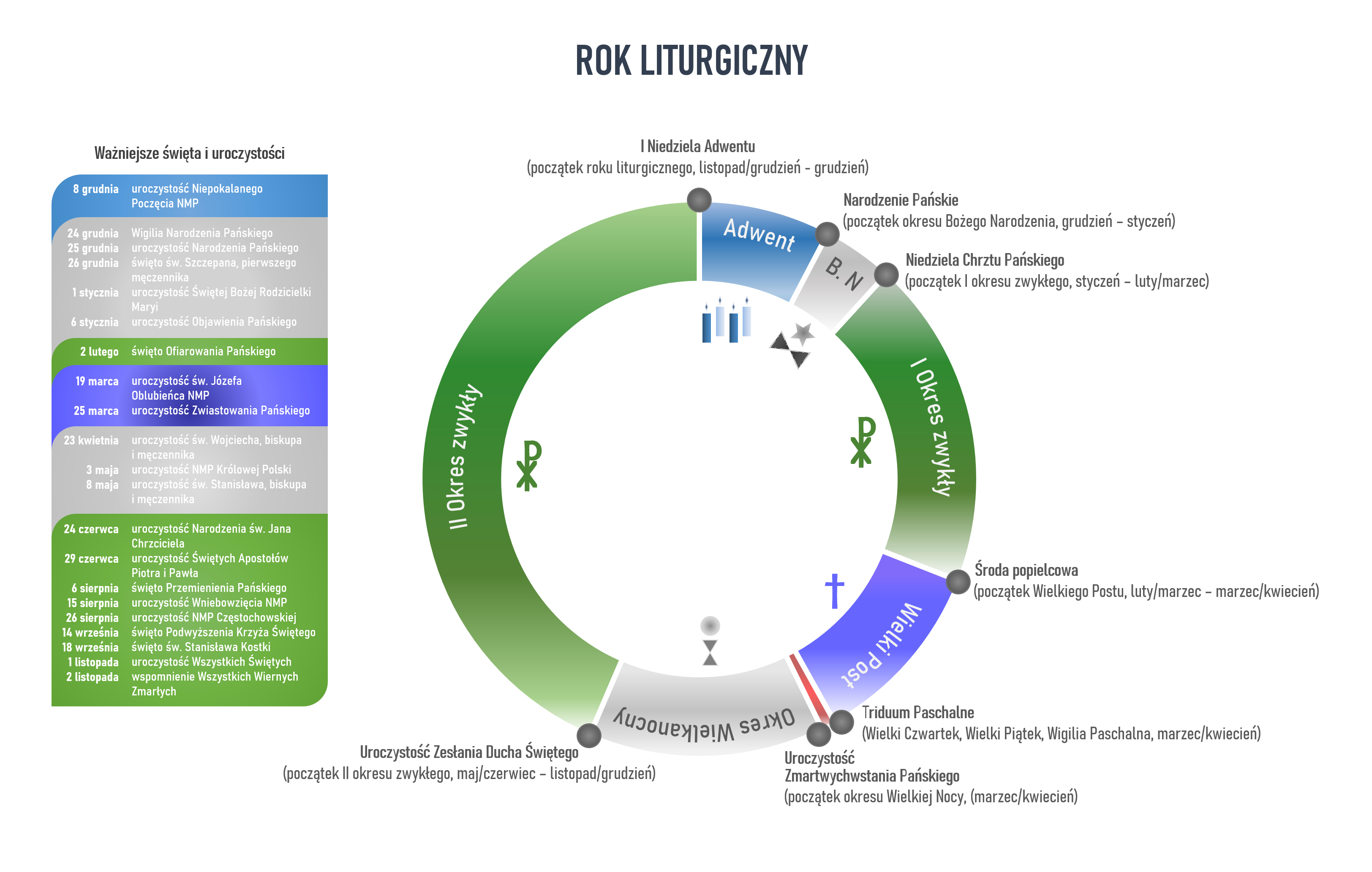 Rok Liturgiczny